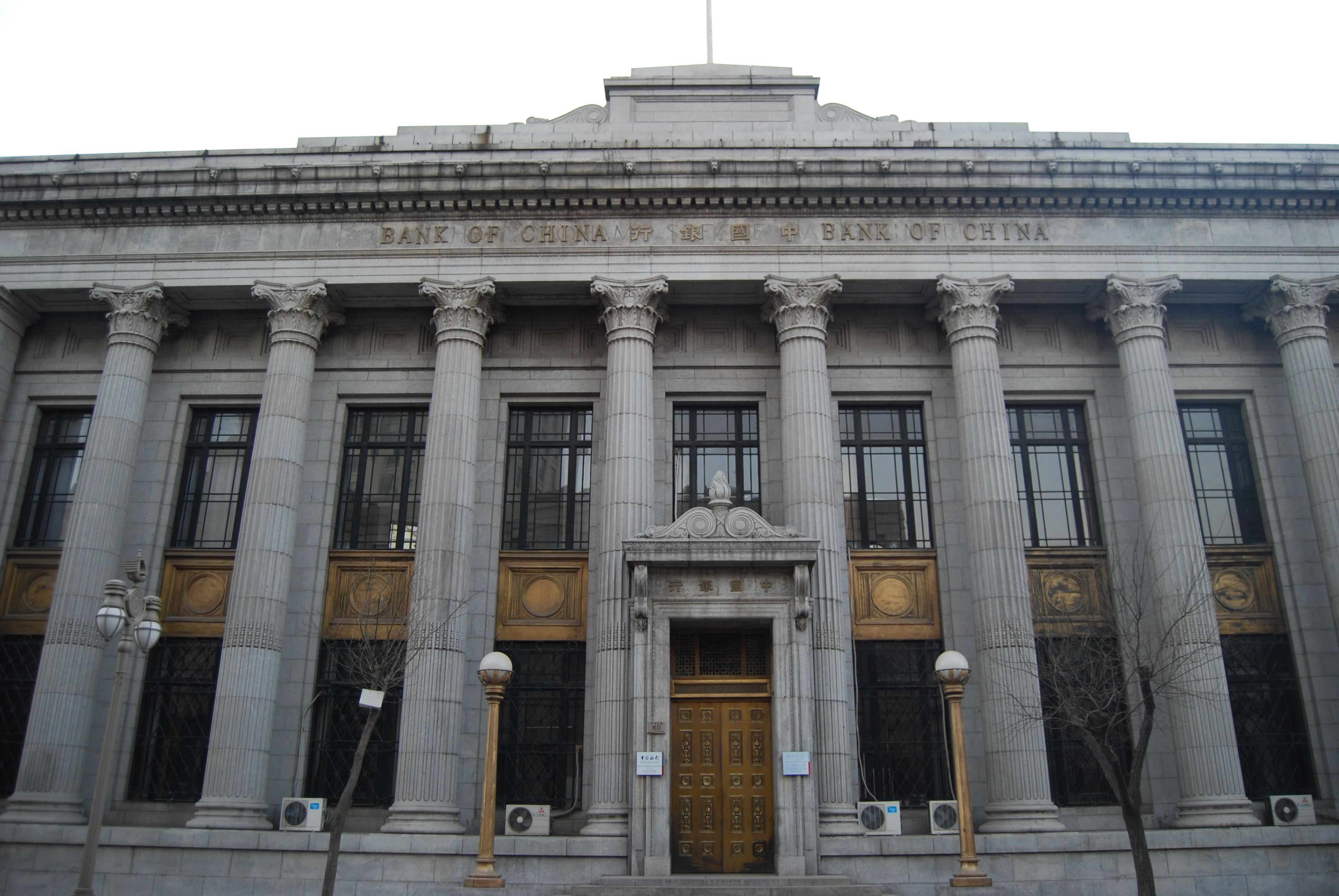 横滨金正银行